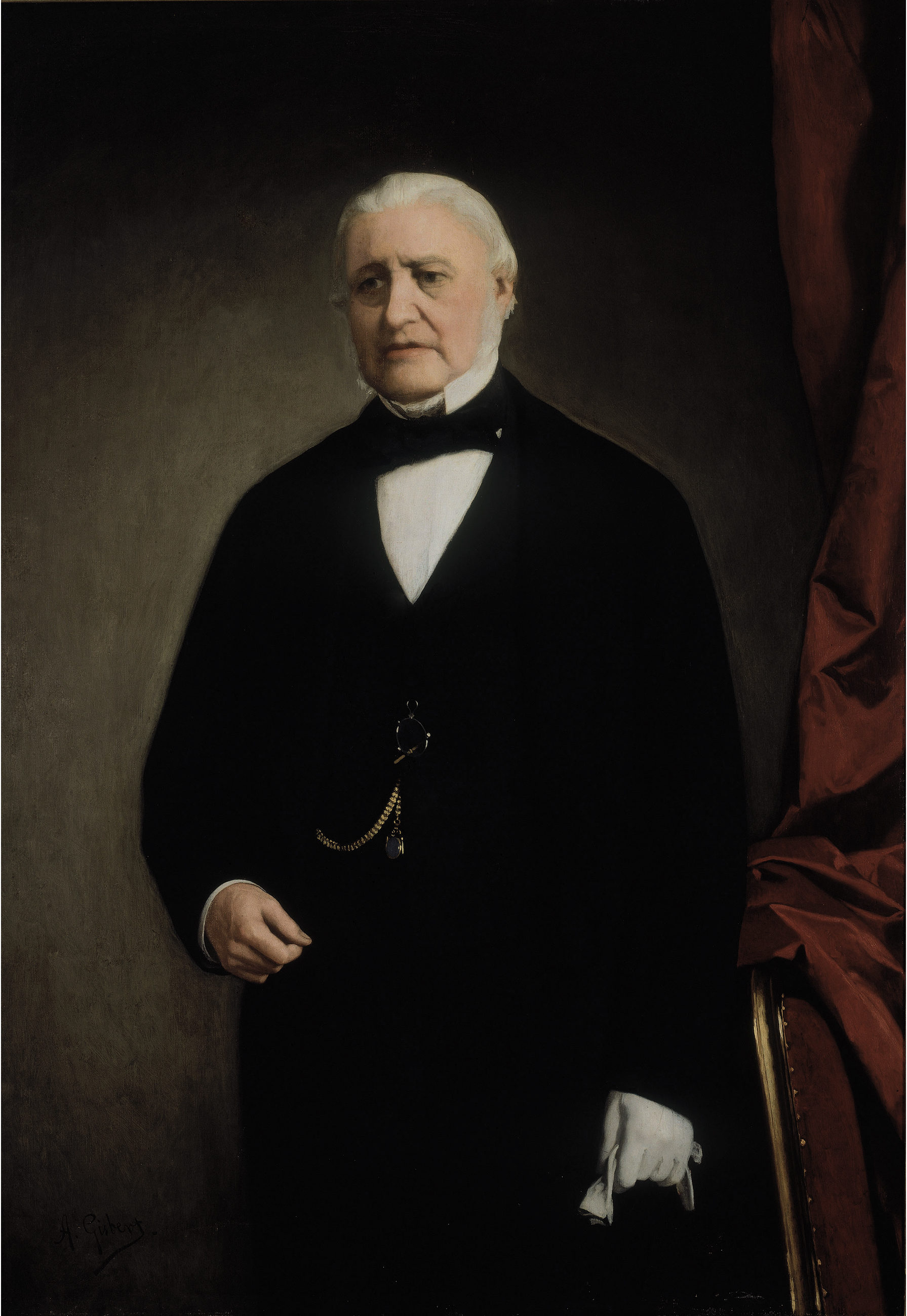 Retrato del politico y diplomático español Francisco Javier de Istúriz (1790-1871), que llegó a ser presidente del Gobierno, de las Cortes Generales y del Congreso de los Diputados y del Senado en diferentes ocasiones.